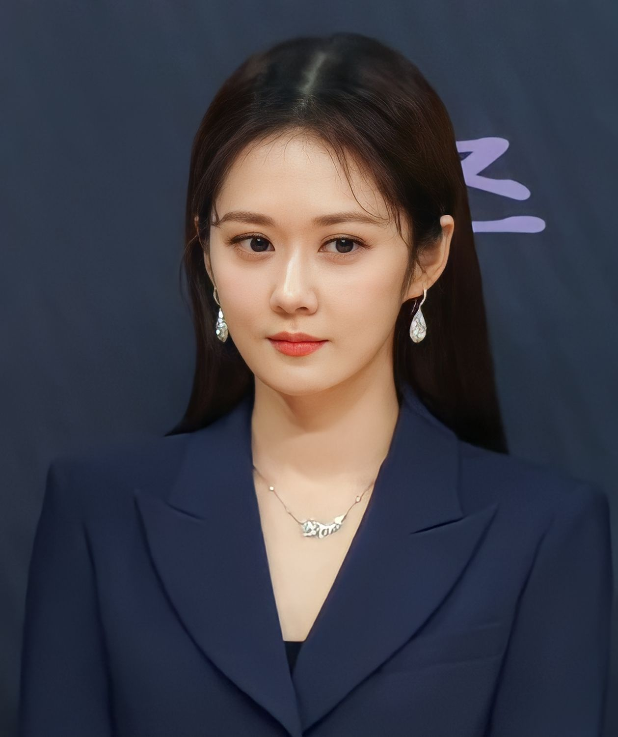 25일 오후 서울시 양천구 목동 SBS에서 새 월화드라마 'VIP'의 제작발표회가 열려 이정림 PD와 배우들이 참석해 단체 포토타임을 갖고 있다.